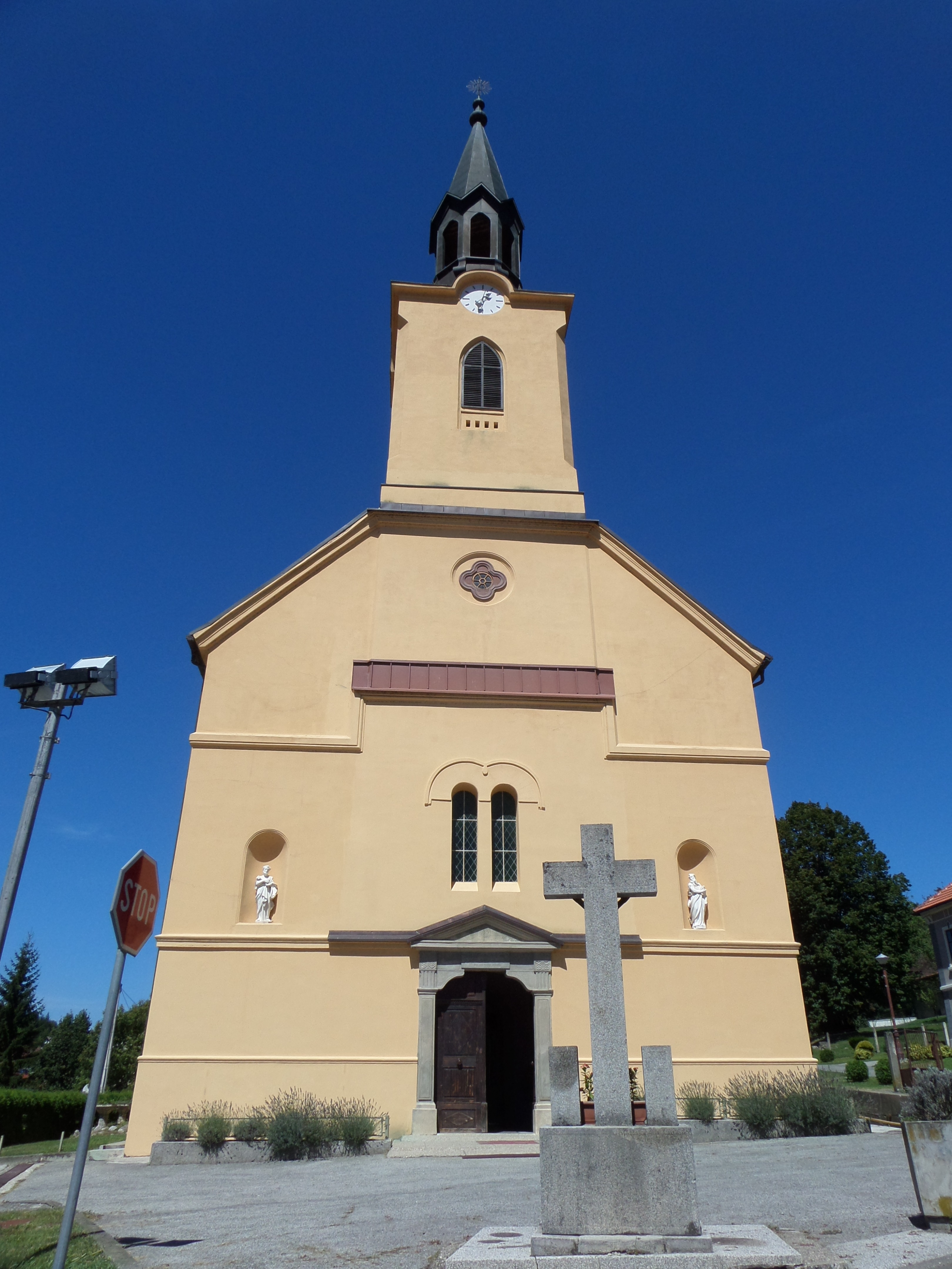 14.08.2016.- 49217, Krapinske Toplice, Croatia